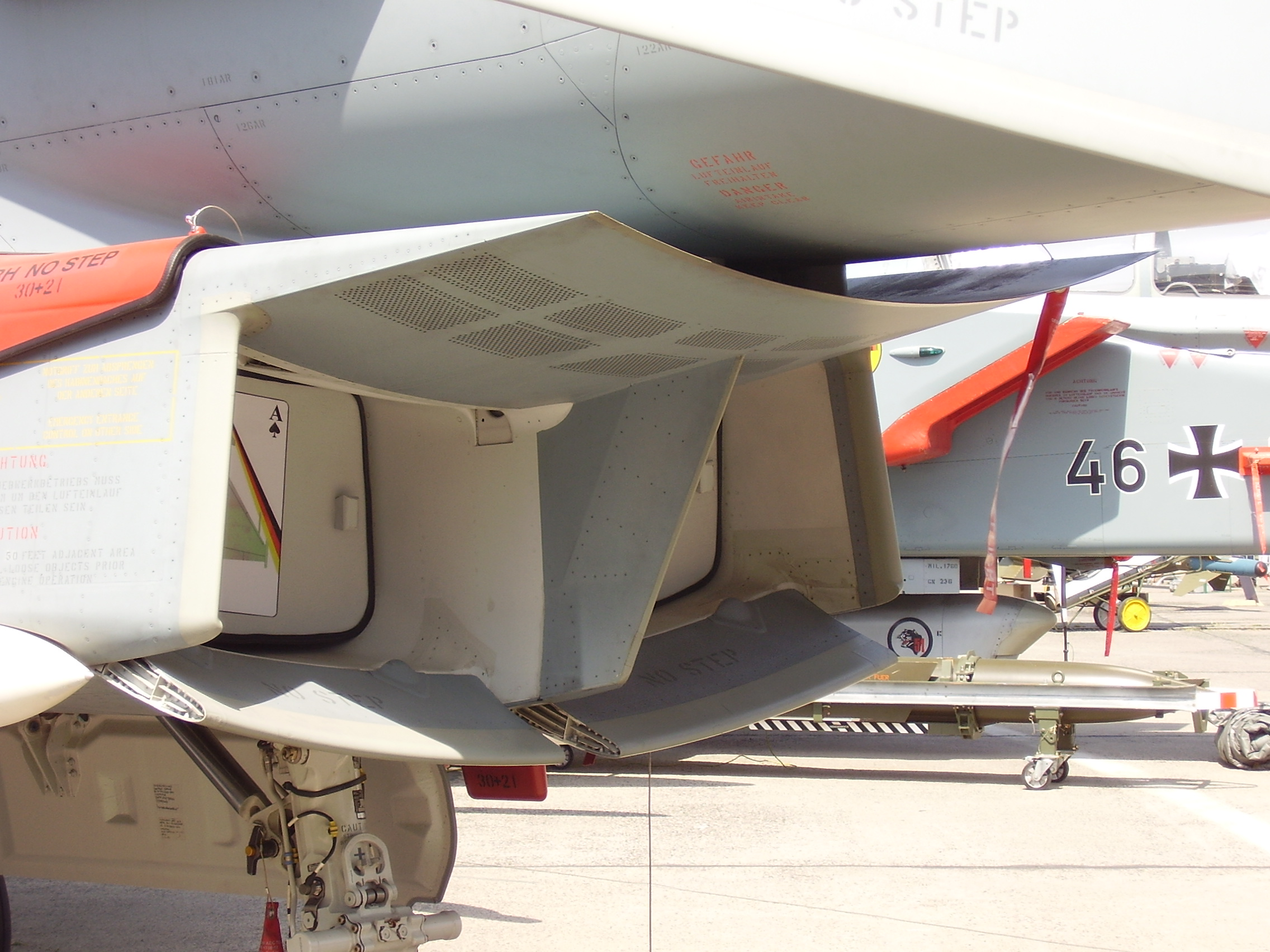 ILA 2008, registration 30+12